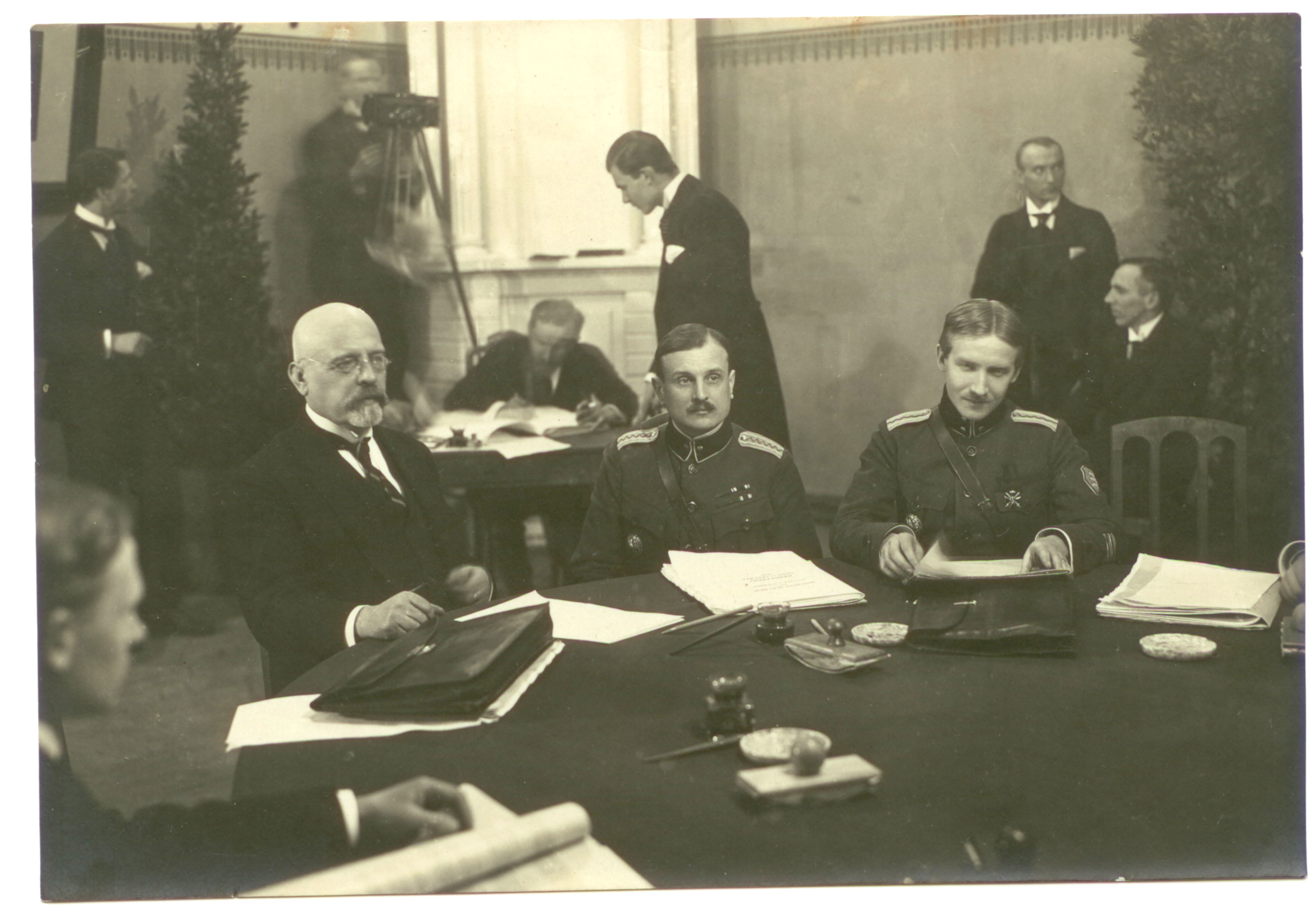 Eesti delegatsiooni liikmed Tartu rahu sõlmimisel. Vasakult - Jaan Poska, kindral Jaan Soots, kolonel Victor Mutt. Fotograaf Armin Lomp (1883-1936). This image on crowdsourcing geotagging platform Ajapaik MUIS: AM F 23531:3